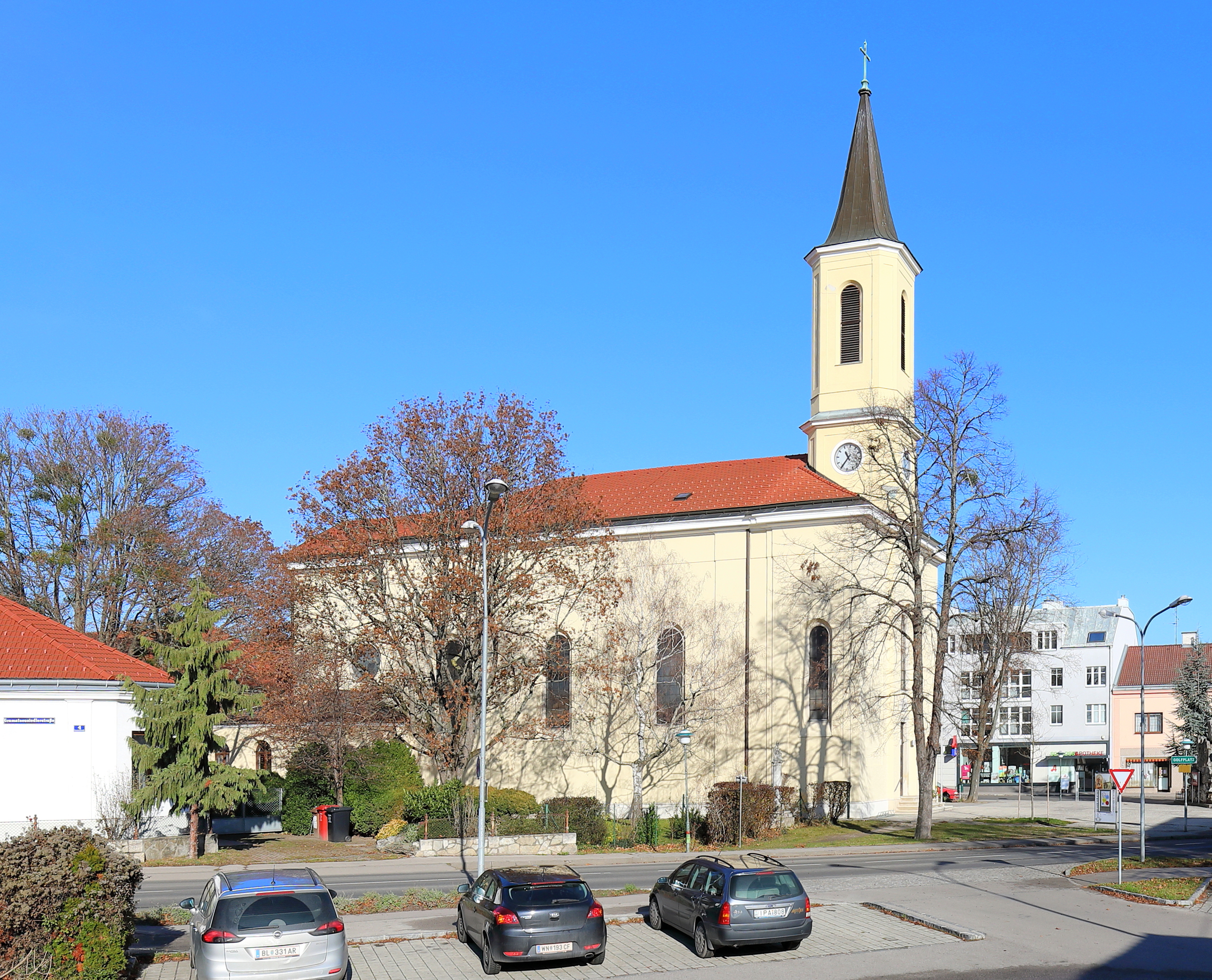 Zentrum der niederösterreichischen Gemeinde Ebergassing mit der röm.-kath. Pfarrkirche Maria Himmelfahrt und davor ein barocker Gnadenstuhl-Figurenbildstock. Die Saalkirche mit zweigeschossigem Fassadenturm und einem quadratischen Chorschluss wurde ab 1851 errichtet und am 25. September 1853 geweiht.